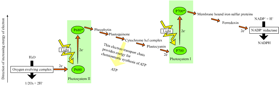 Z-scheme